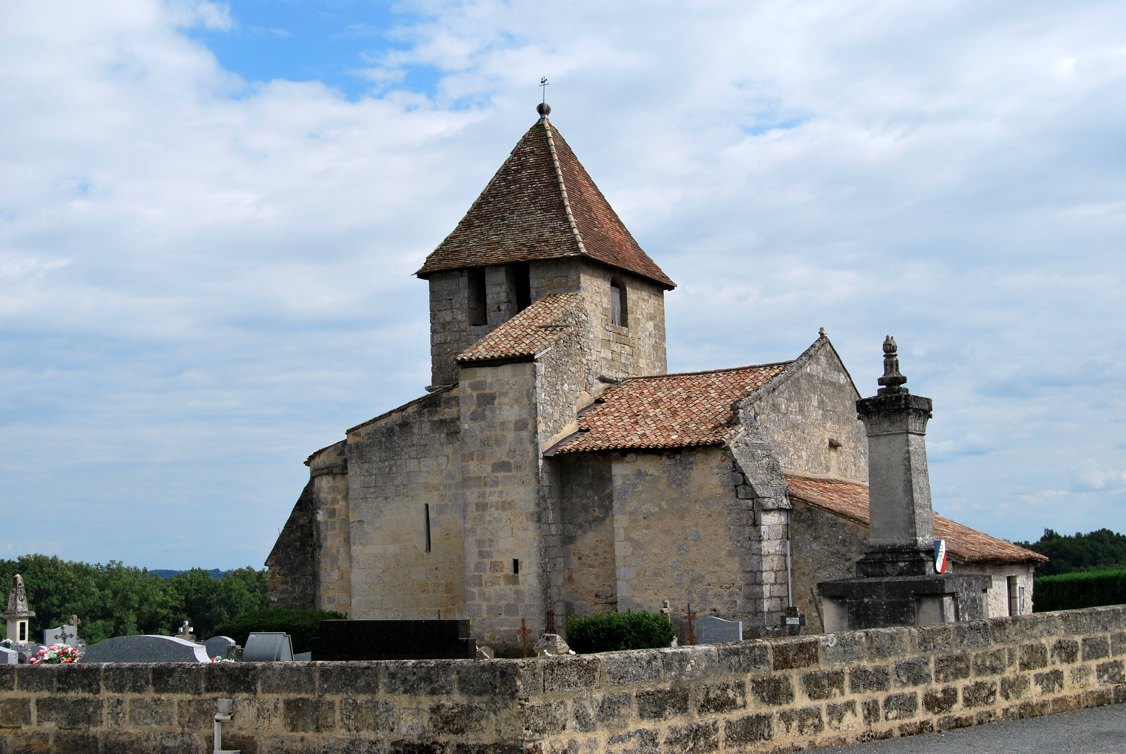 Église Saint-Pierre des Salles-de-Castillon